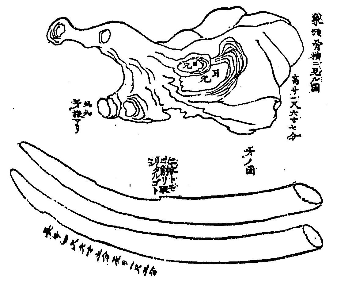 東京都中野区・宝仙寺が所蔵していた象の頭骨と牙（『新編武蔵風土記稿』巻124に掲載）。